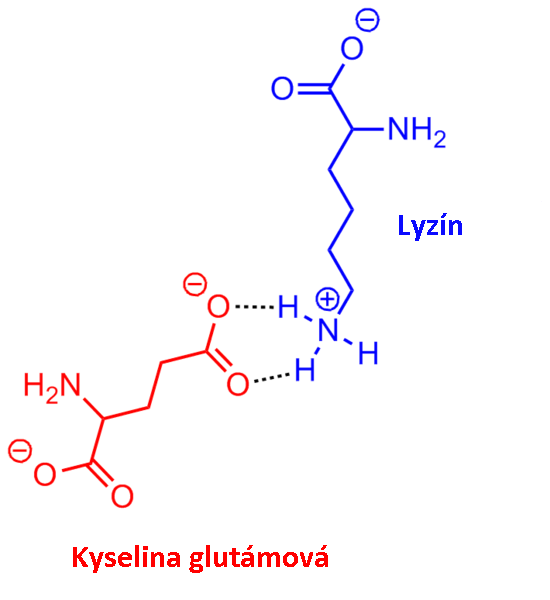 Soľný mostík